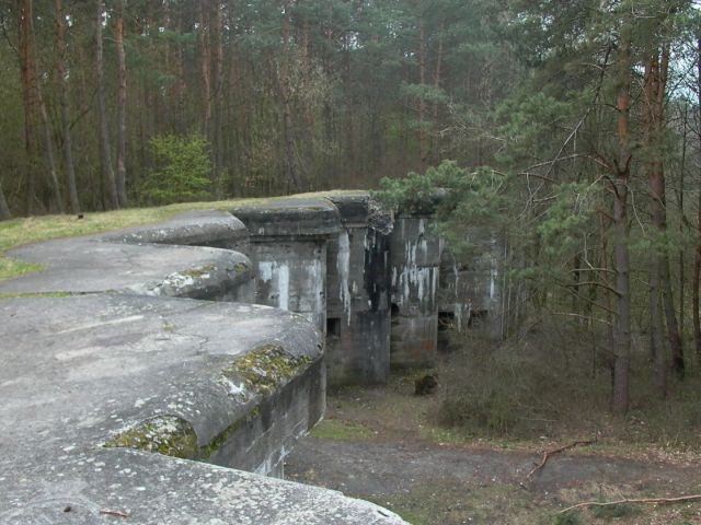 Fotografia przedstawia kojec przeciwskarpowy Fortu V Twierdzy Modlin.